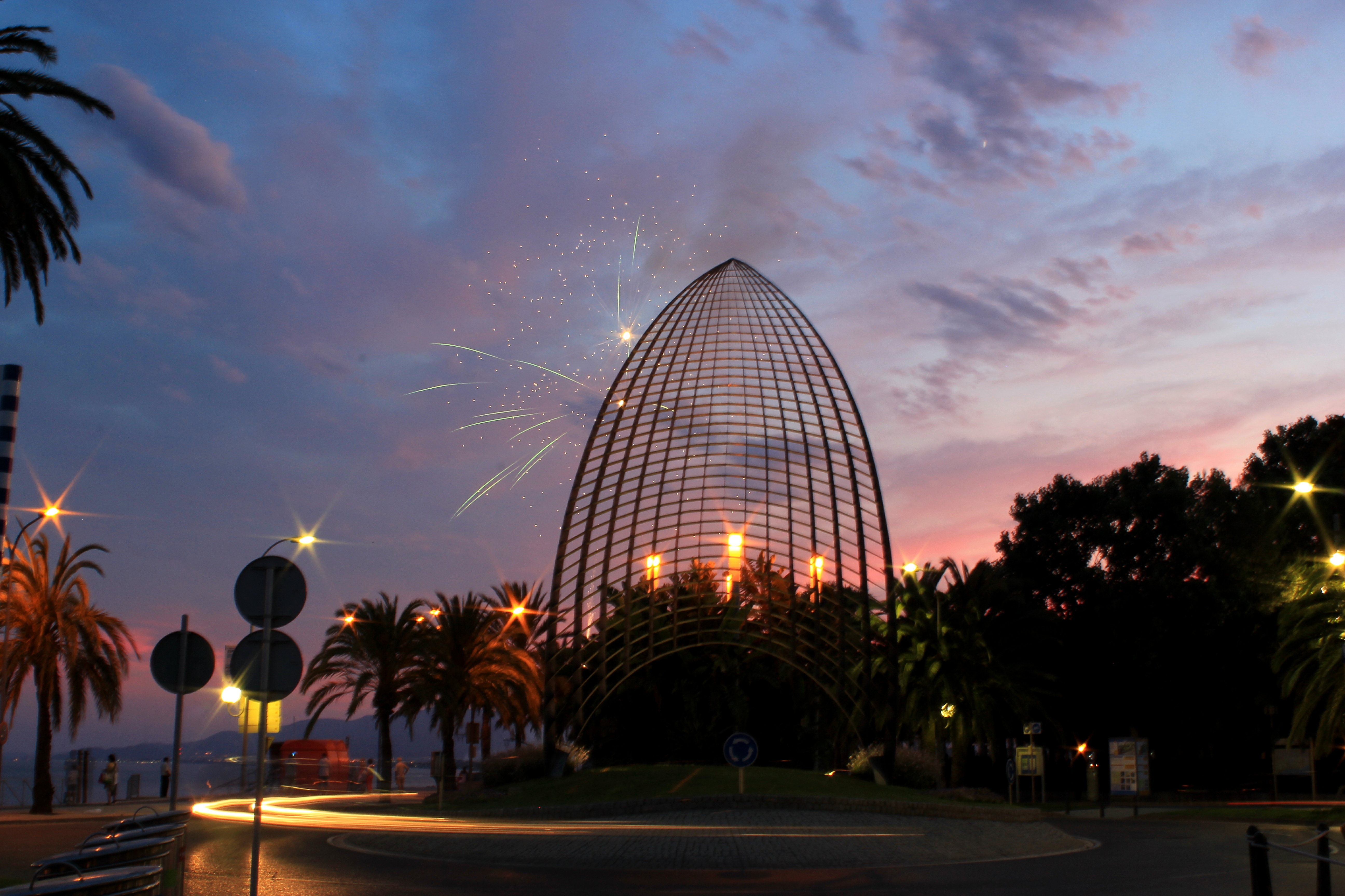 FESTA DE SAN JOAN